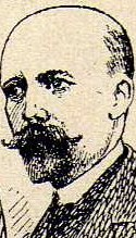 Paul Hillemacher